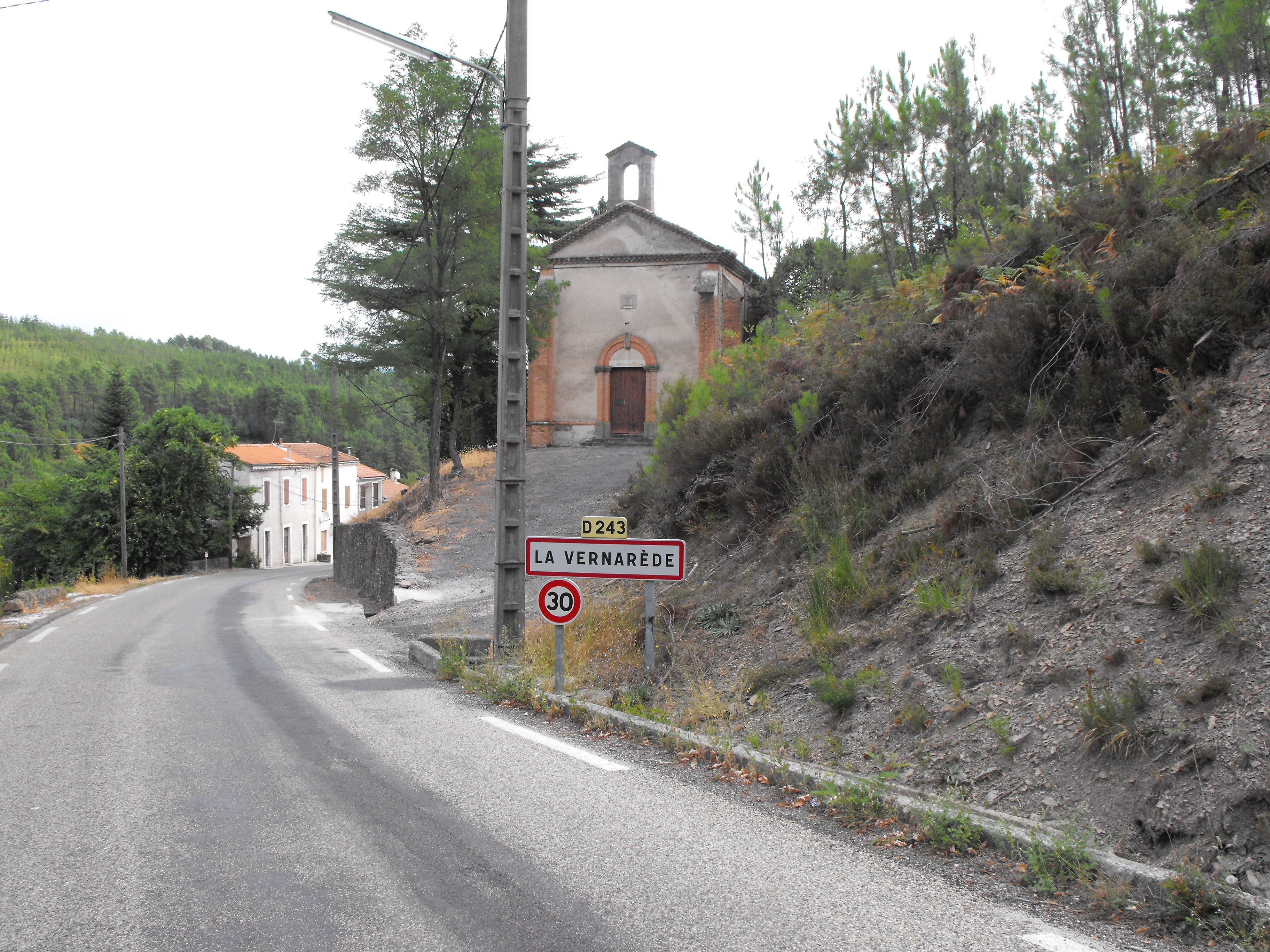 l'entrée du village